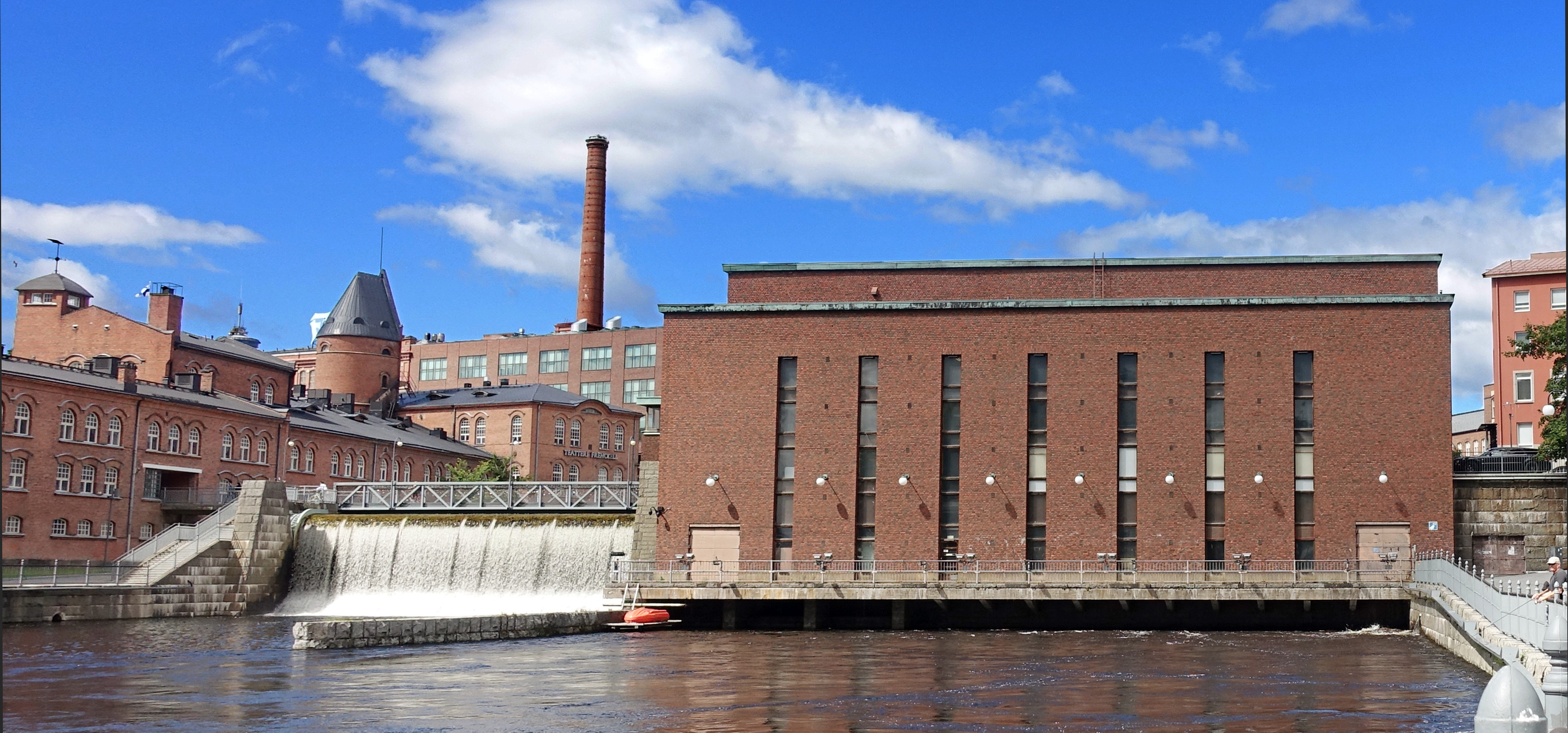 Keskikosken Voimalaitos. Tammerkoski, Tampere.